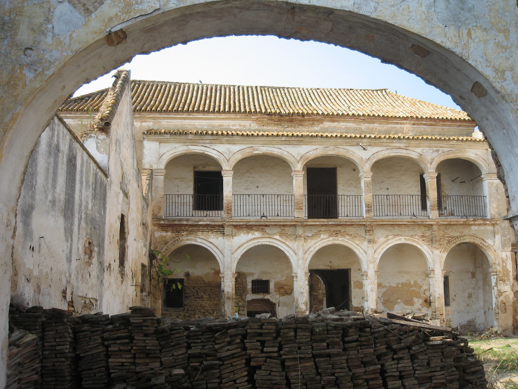 Fachada interior de la Casa de Arizón en Sanlúcar de Barrameda